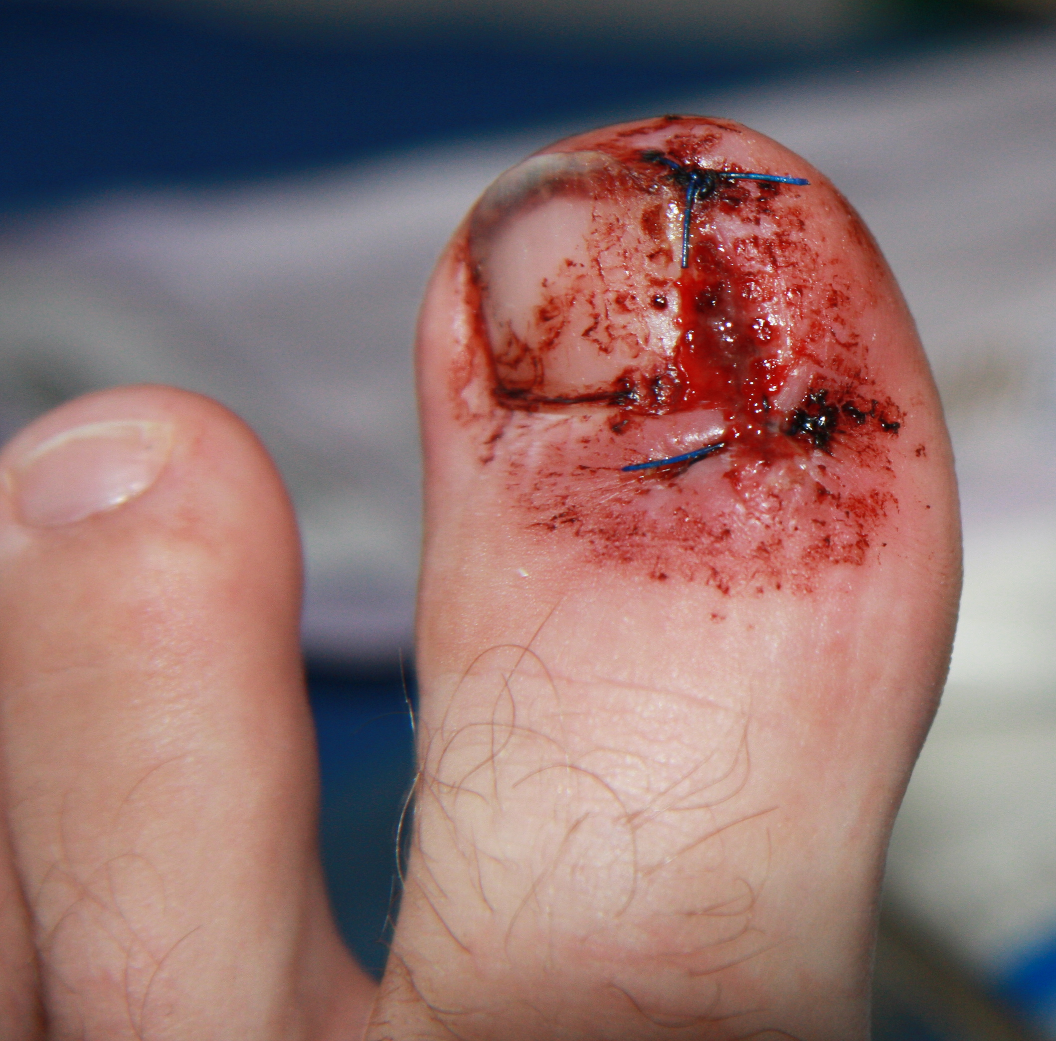 Bild eines großen Zehs zwei Tage nach einer Emmert-Plastik bei Verbandwechsel